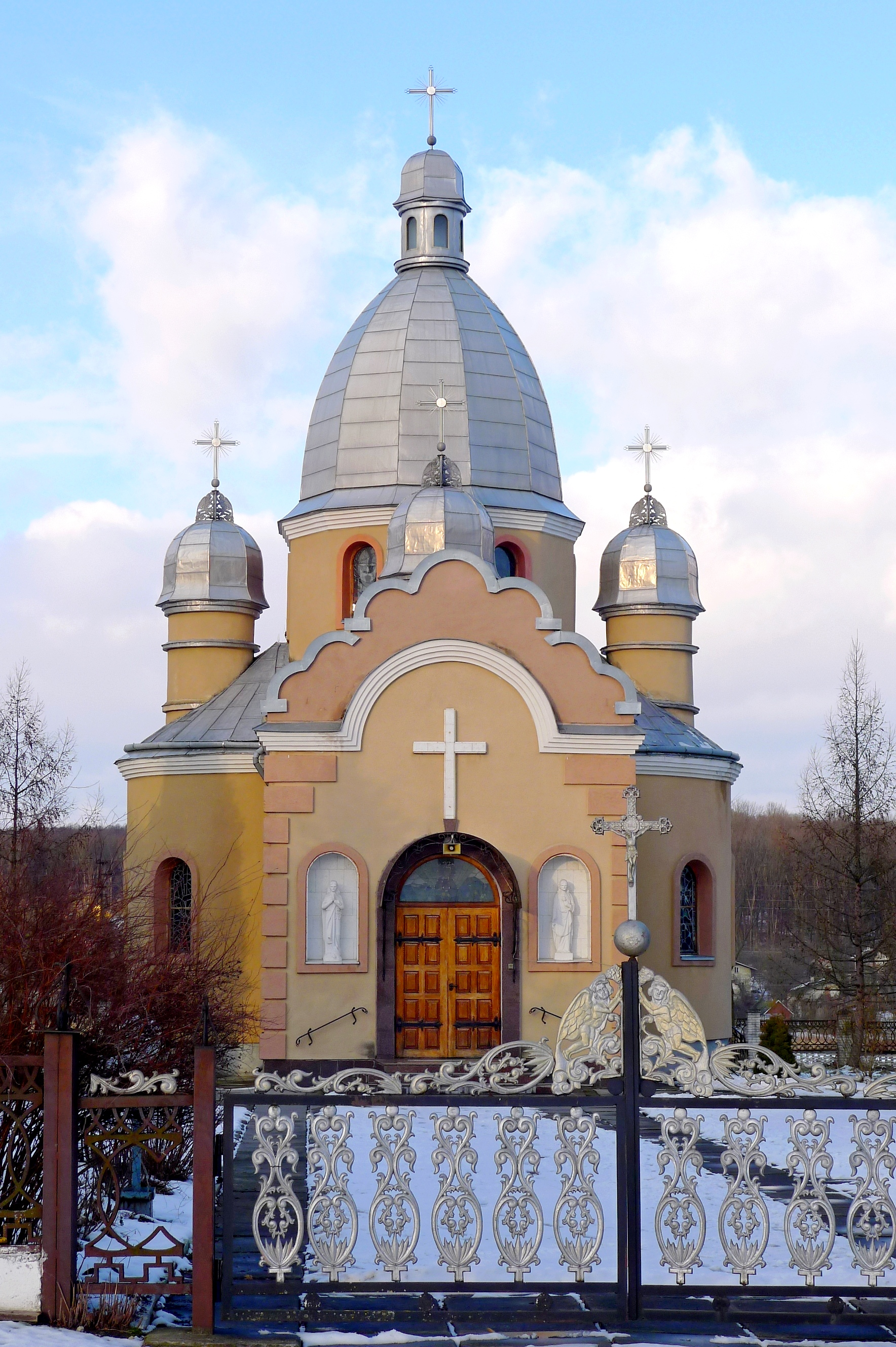 Дрогобич - Церква Покрови Пресвятої Богородиці